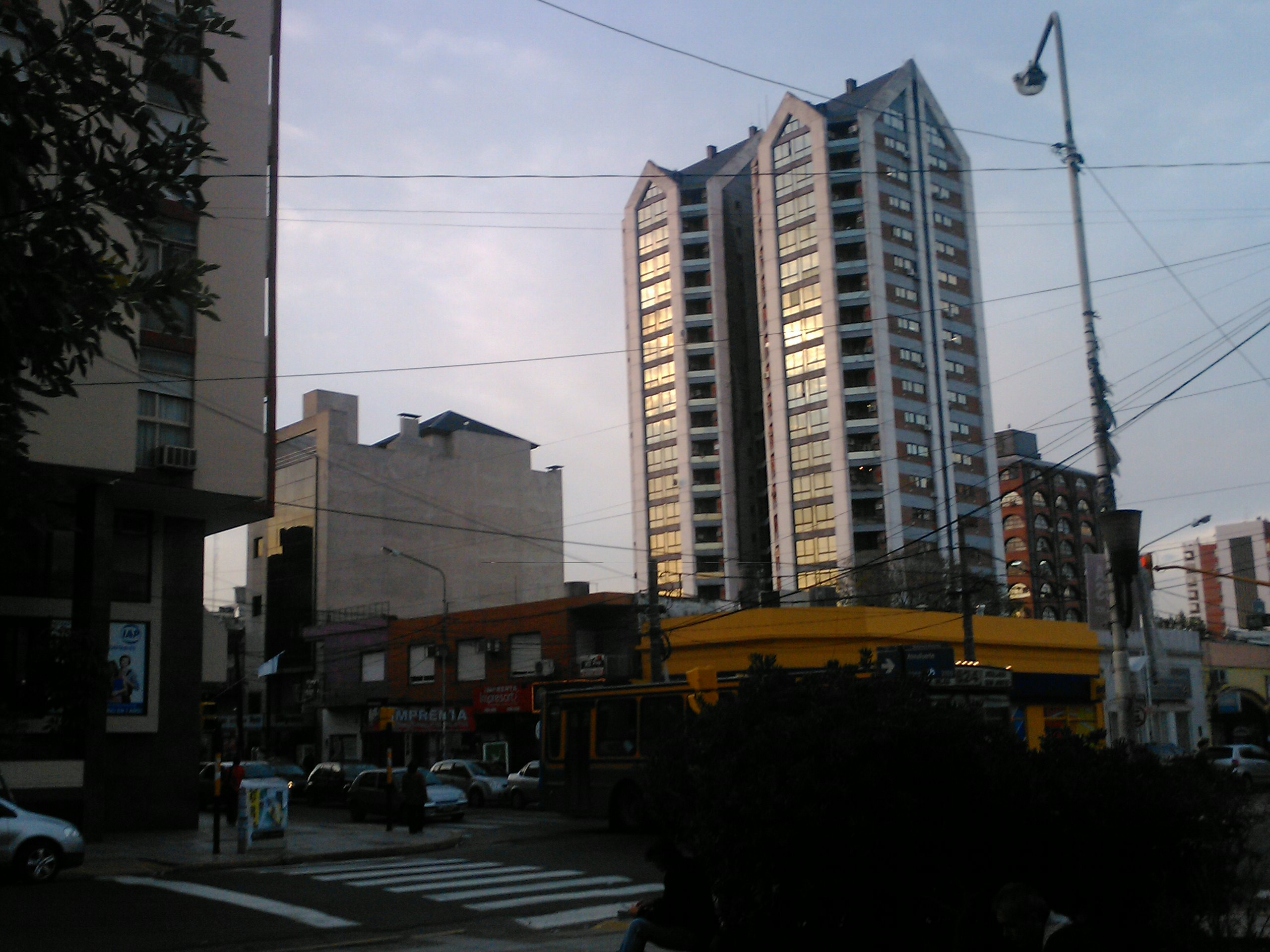 Torres de San Justo, complejo residencial de 2 torres de 18 pisos sobre la calle Entre Ríos 2969. San Justo, Prov. de Buenos Aires.